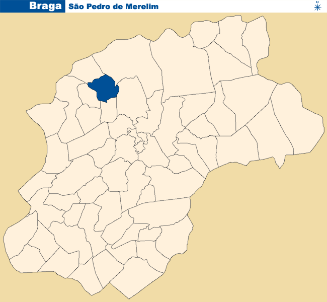 Localização de São Pedro de Merelim no concelho de Braga.